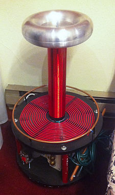 ا